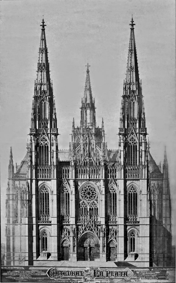 Fachada principal del proyecto para Catedral de La Plata hecho por el ingeniero Pedro Benoit en 1889 y terminado de construir recién en 1999.